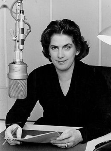 Maud Reuterswärd 1953